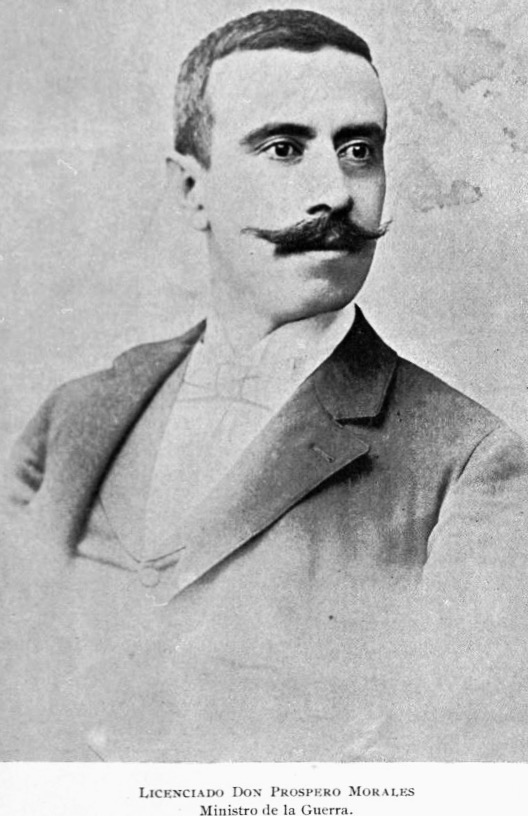 Próspero Morales, ministro de la Guerra del gobierno del general José María Reina Barrios